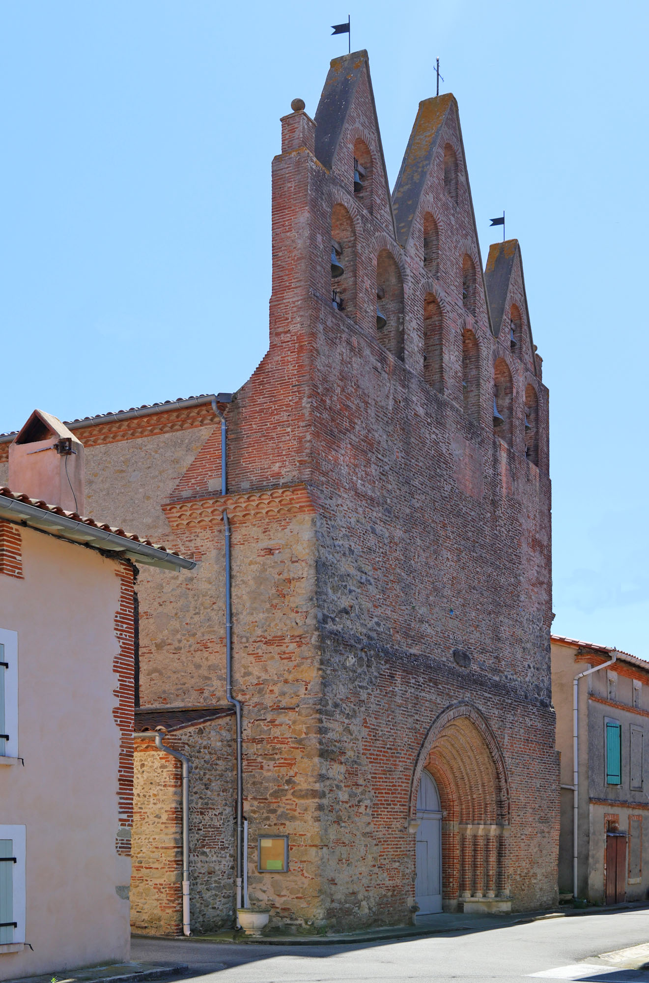 Façade ouest